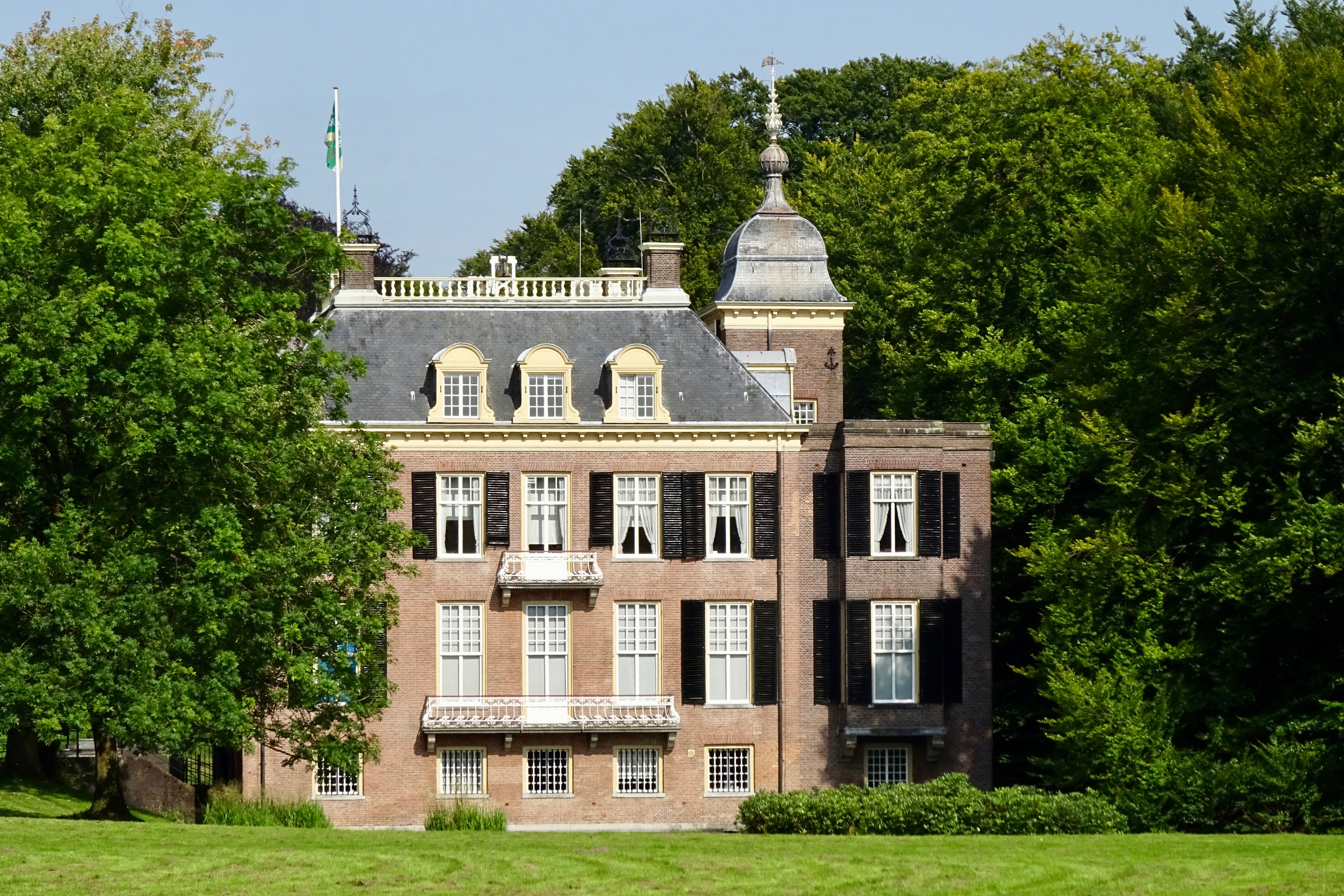 Rechterzijgevel van het Huis Zypendaal te Arnhem